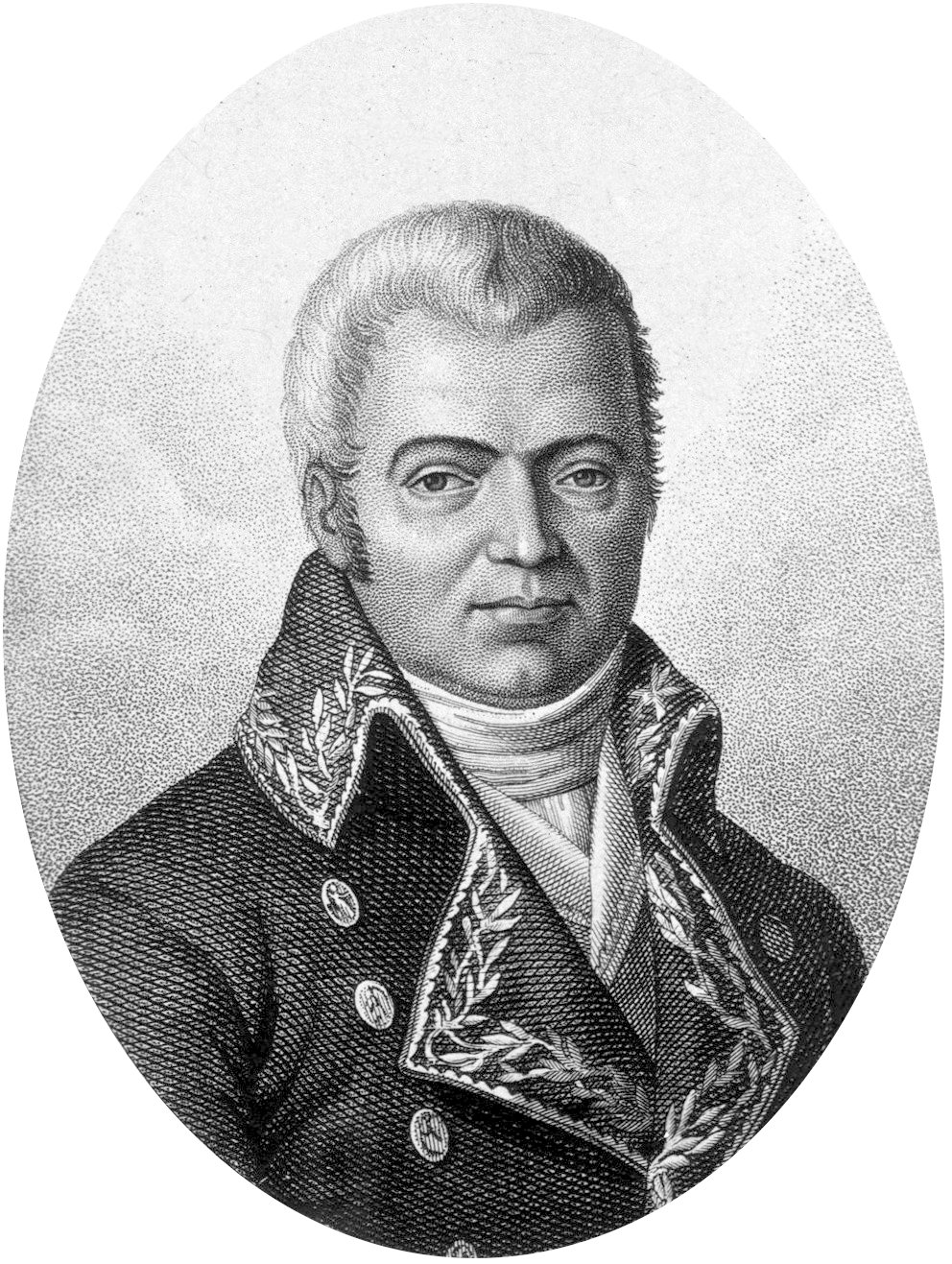 Portrait de Pierre Marie Auguste Broussonet (1761-1807)